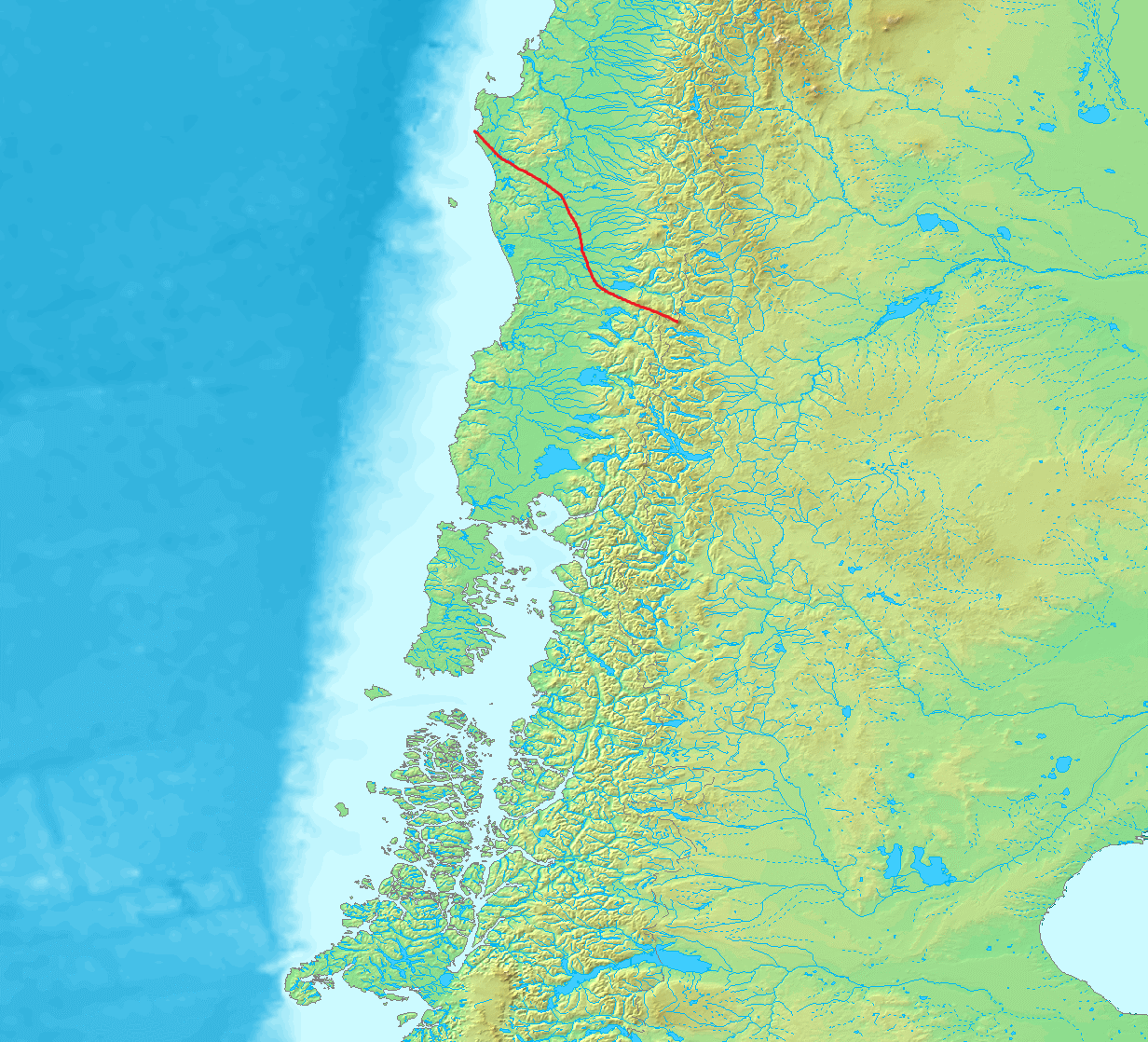 Mapa con la Falla de Lanalhue tal como se creía antes. Se creía que se extendía desde Lebu (puerto) hasta el Volcán Lanín. Se creía también que había generado los volcanes Villarrica, Quetrupillan y Lanín.